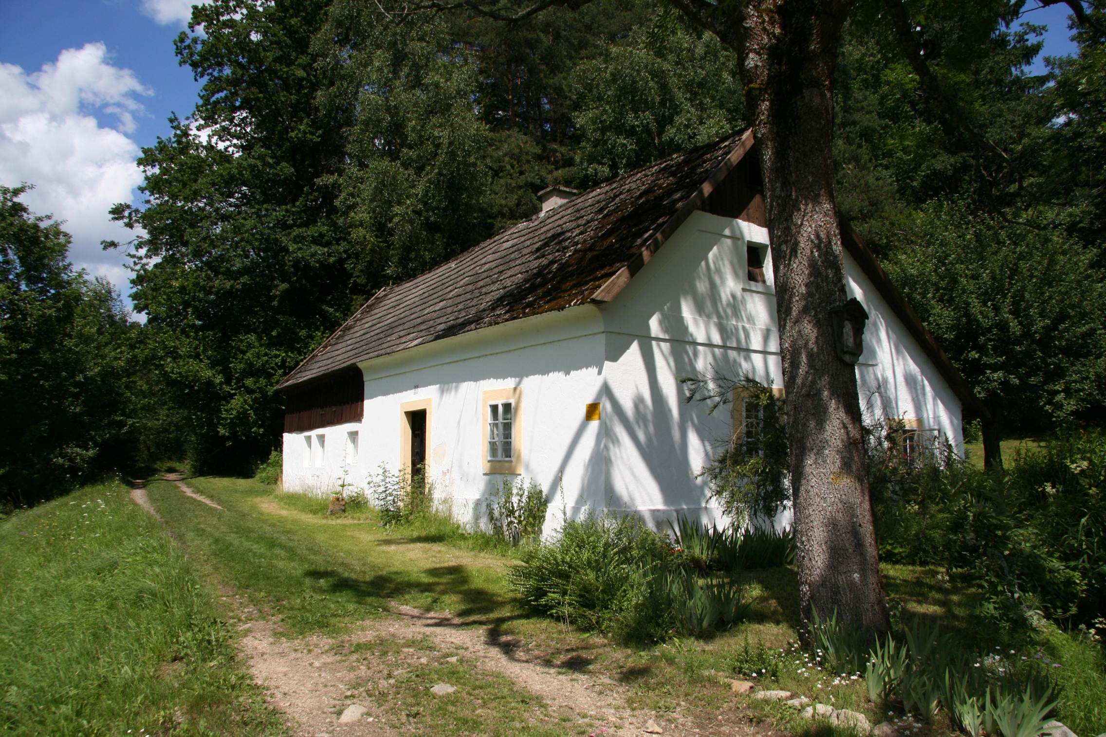 Wächterhaus 39 der Pferdeeisenbahn Budweis–Linz im Mühlviertel.